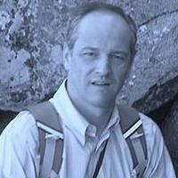 Javier de Carlos